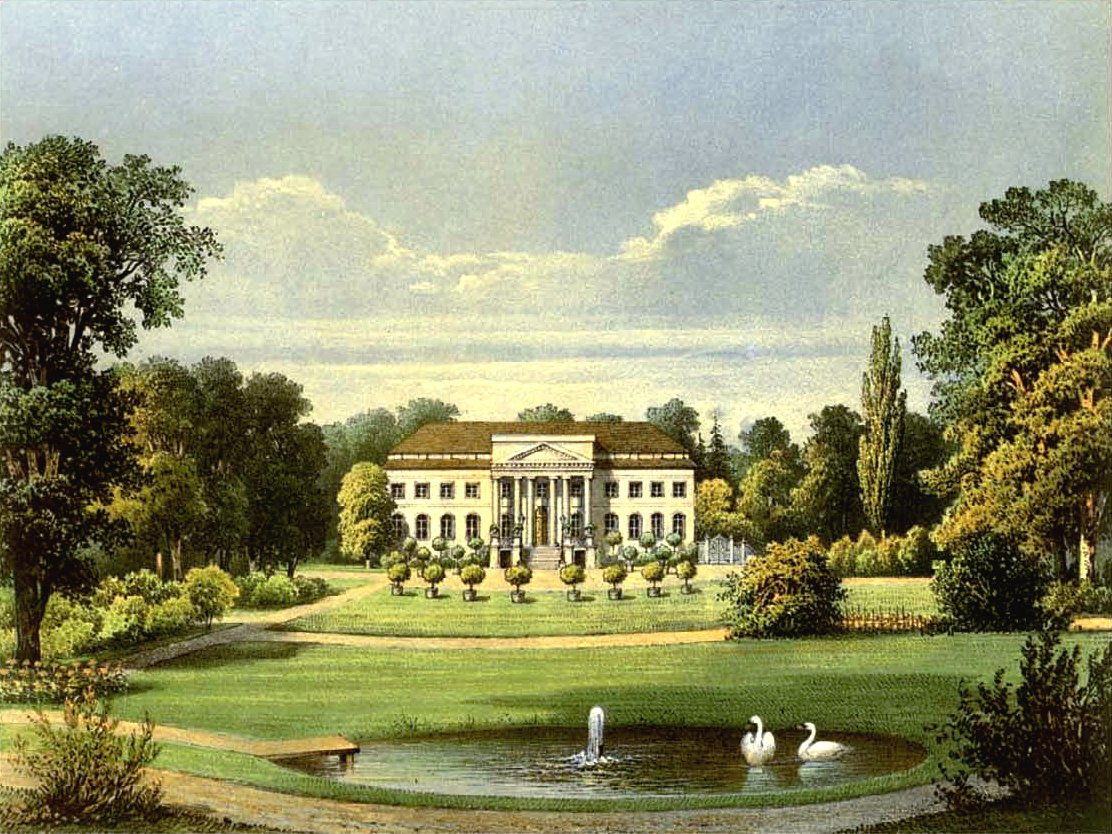 Schloss Panthenau, Kreis Goldberg Hainau, Provinz Schlesien